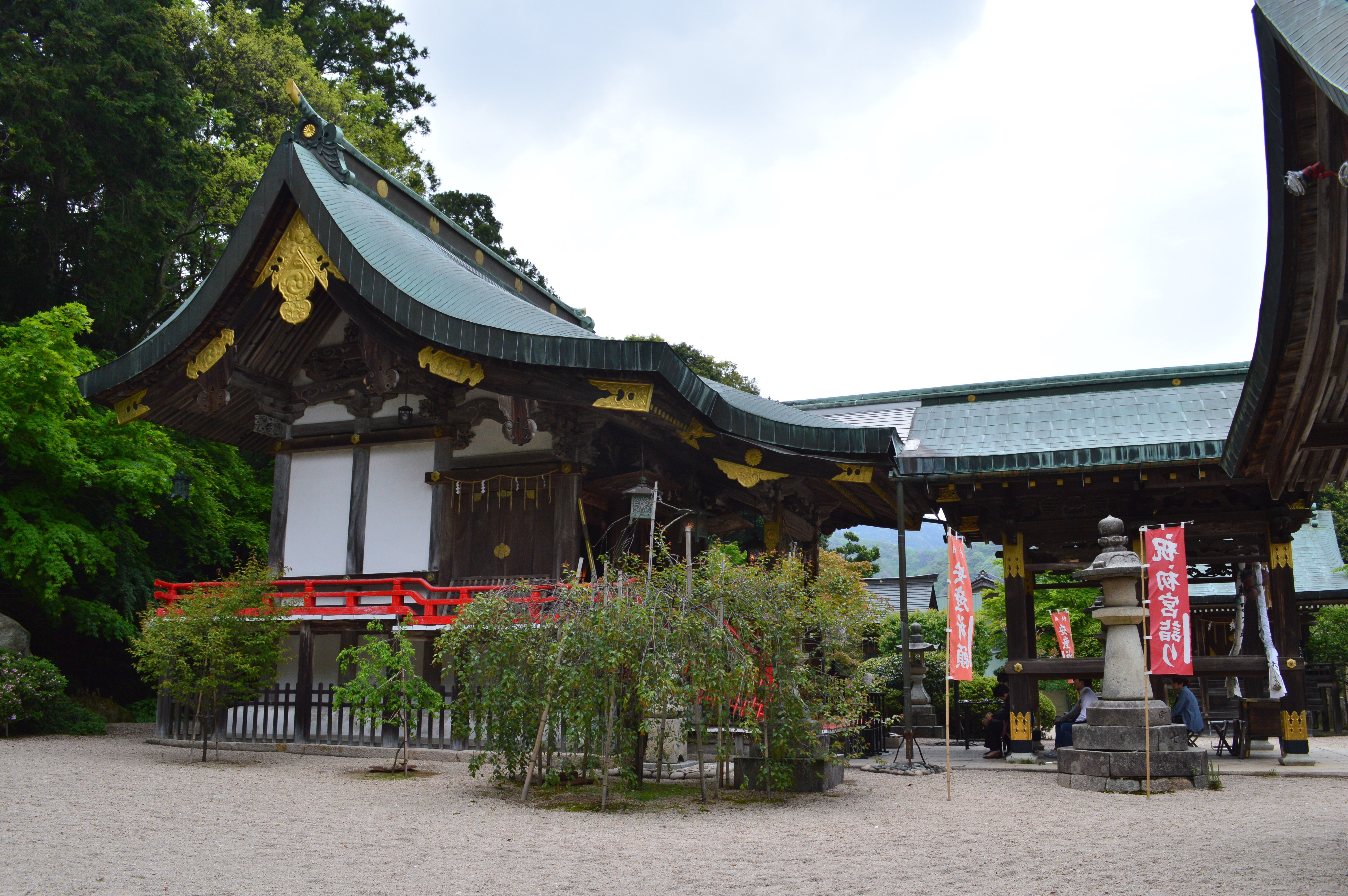 常宮神社 本殿と拝所